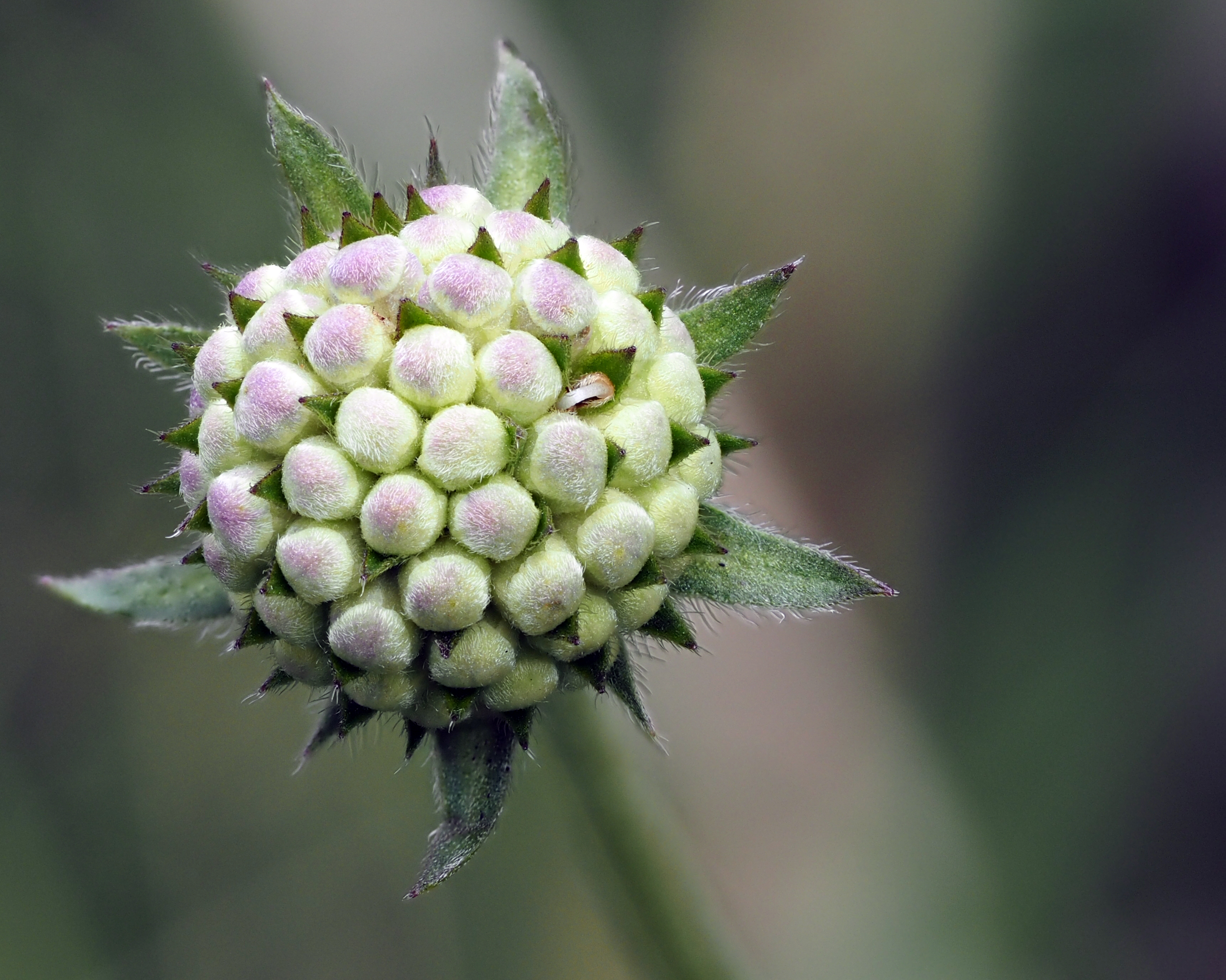 Gewöhnlicher Teufelsabbiss (Succisa pratensis) im frühen Stadium, Südheide (Germany)